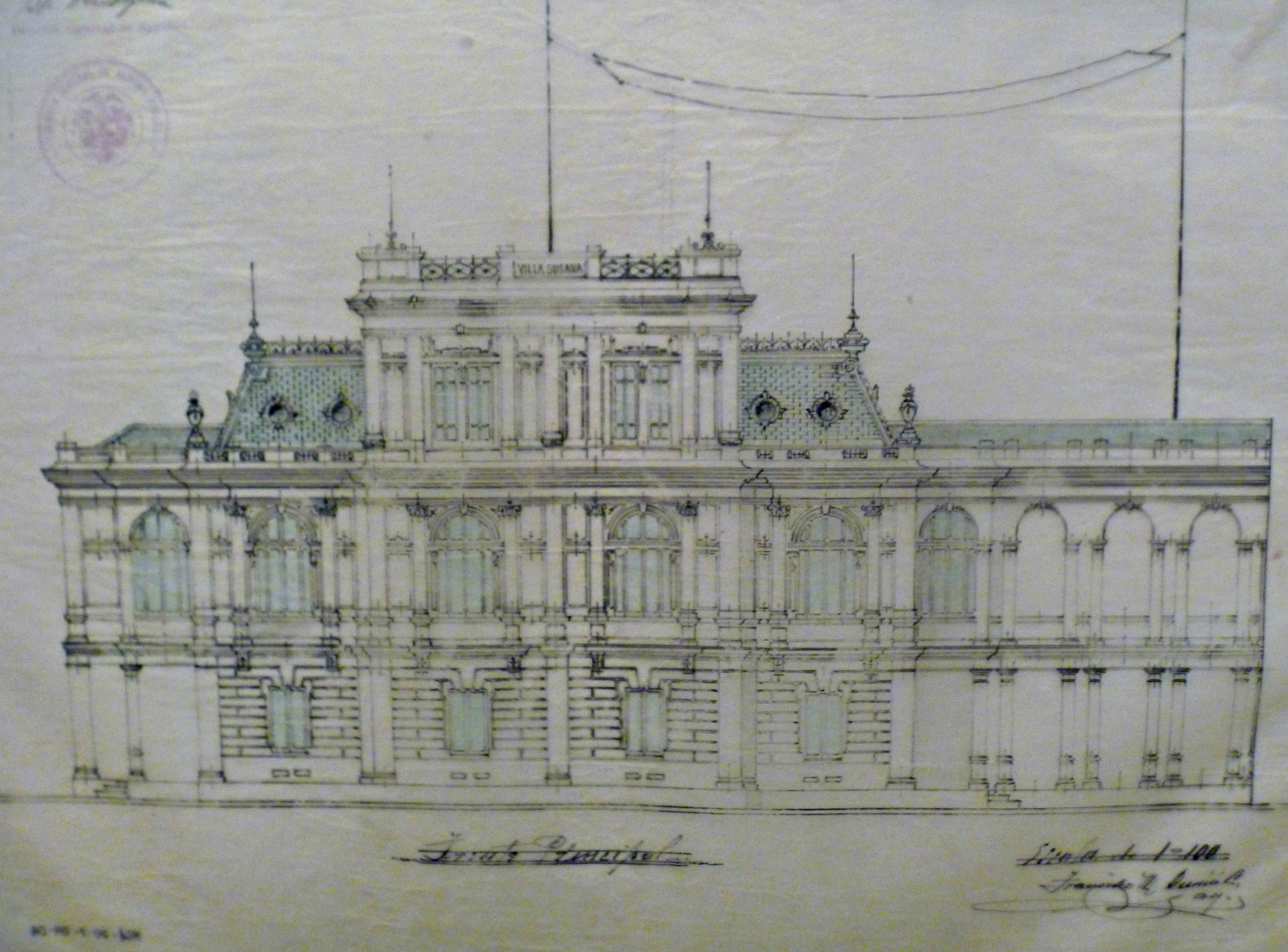 Dibujo del proyecto del actual Palacio de Najas. Durante su proyección fue llamado Villa Susana, en honor a la esposa de quien la ordeno, Susane de Lavelle, casada con Constantino Najas. Tinta sobre papel, Francisco Durini Cáceres (1923).